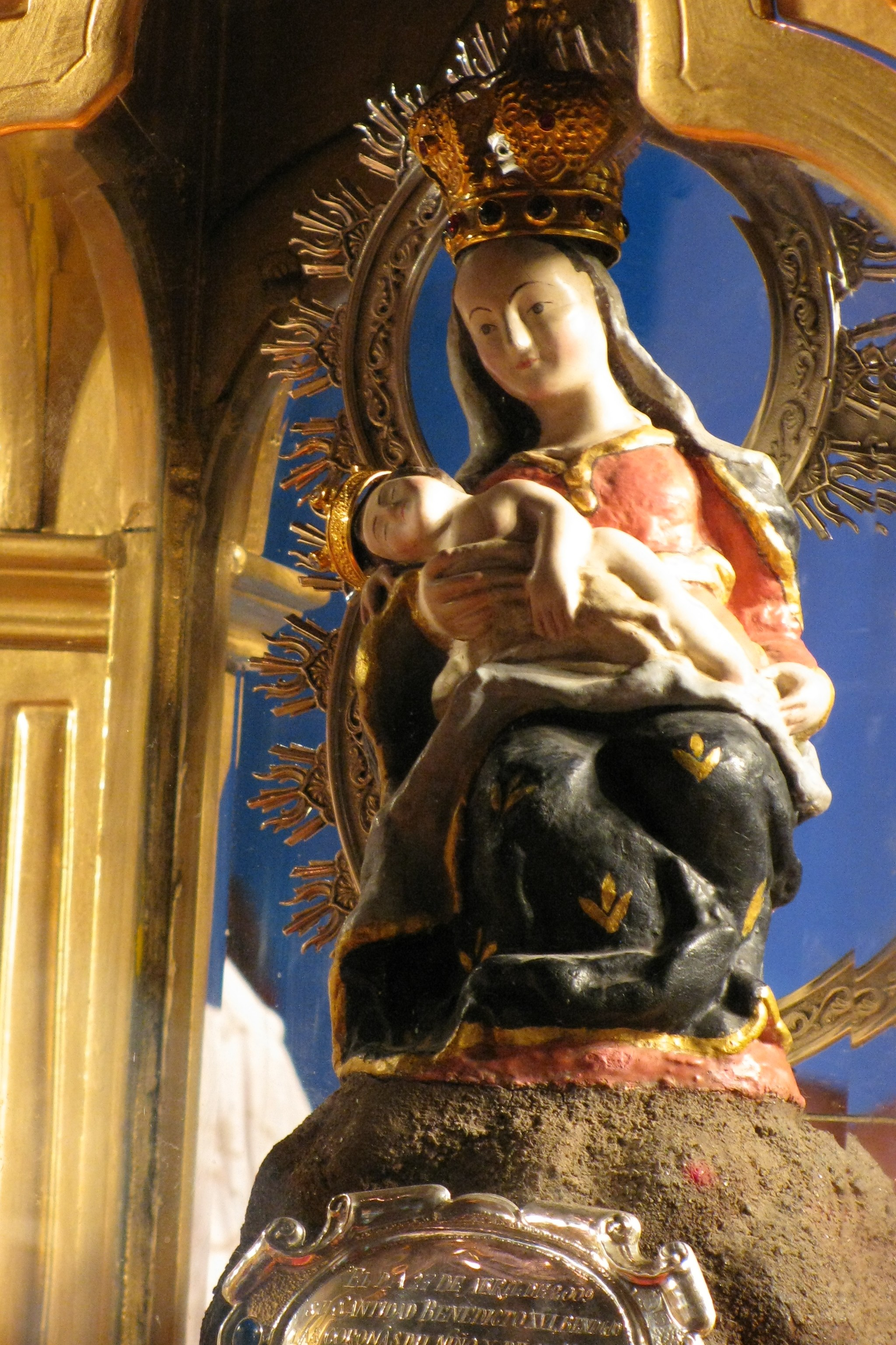 Imagen de la virgen de la consolación.